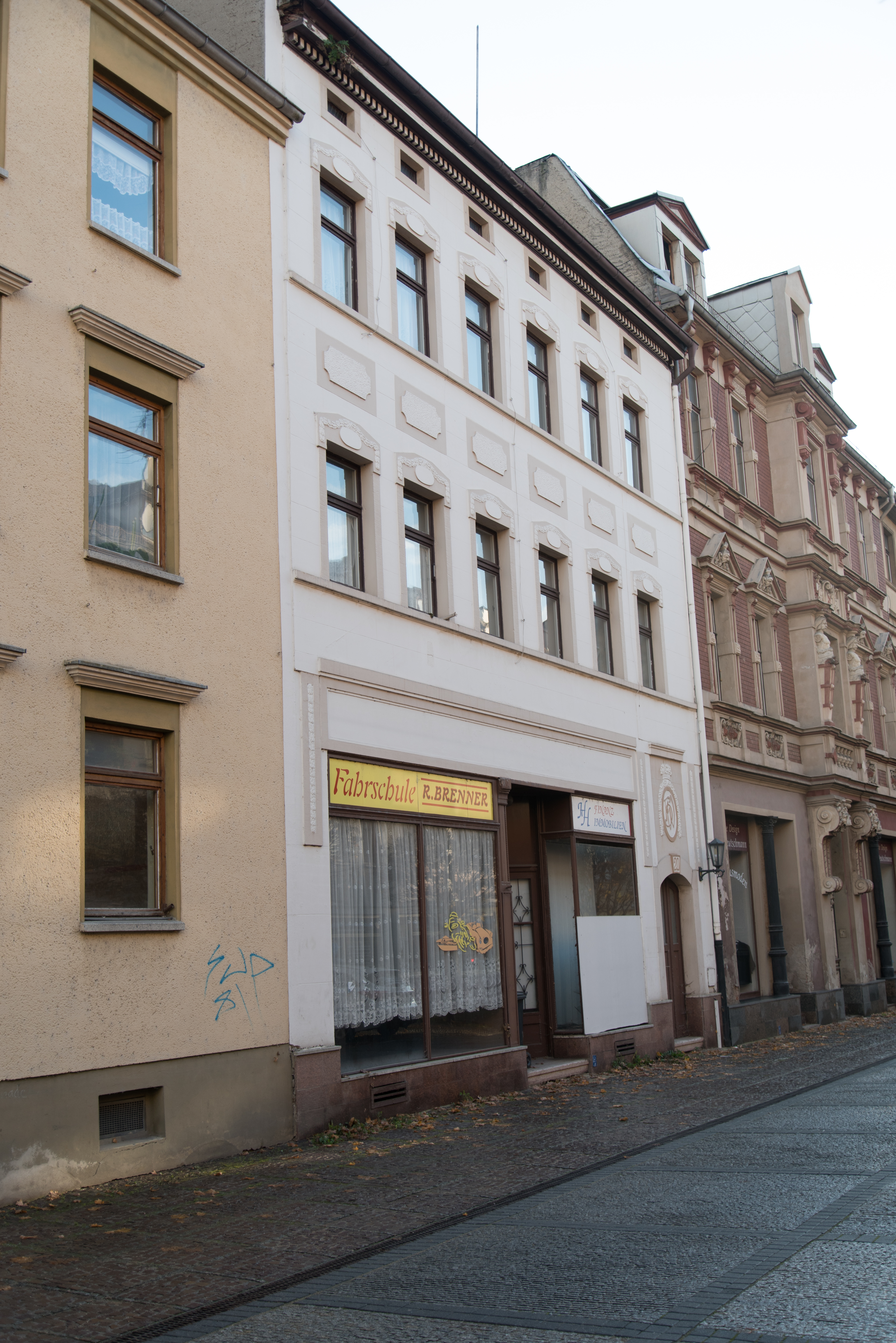 Weißenfels, Nikolaistraße 20